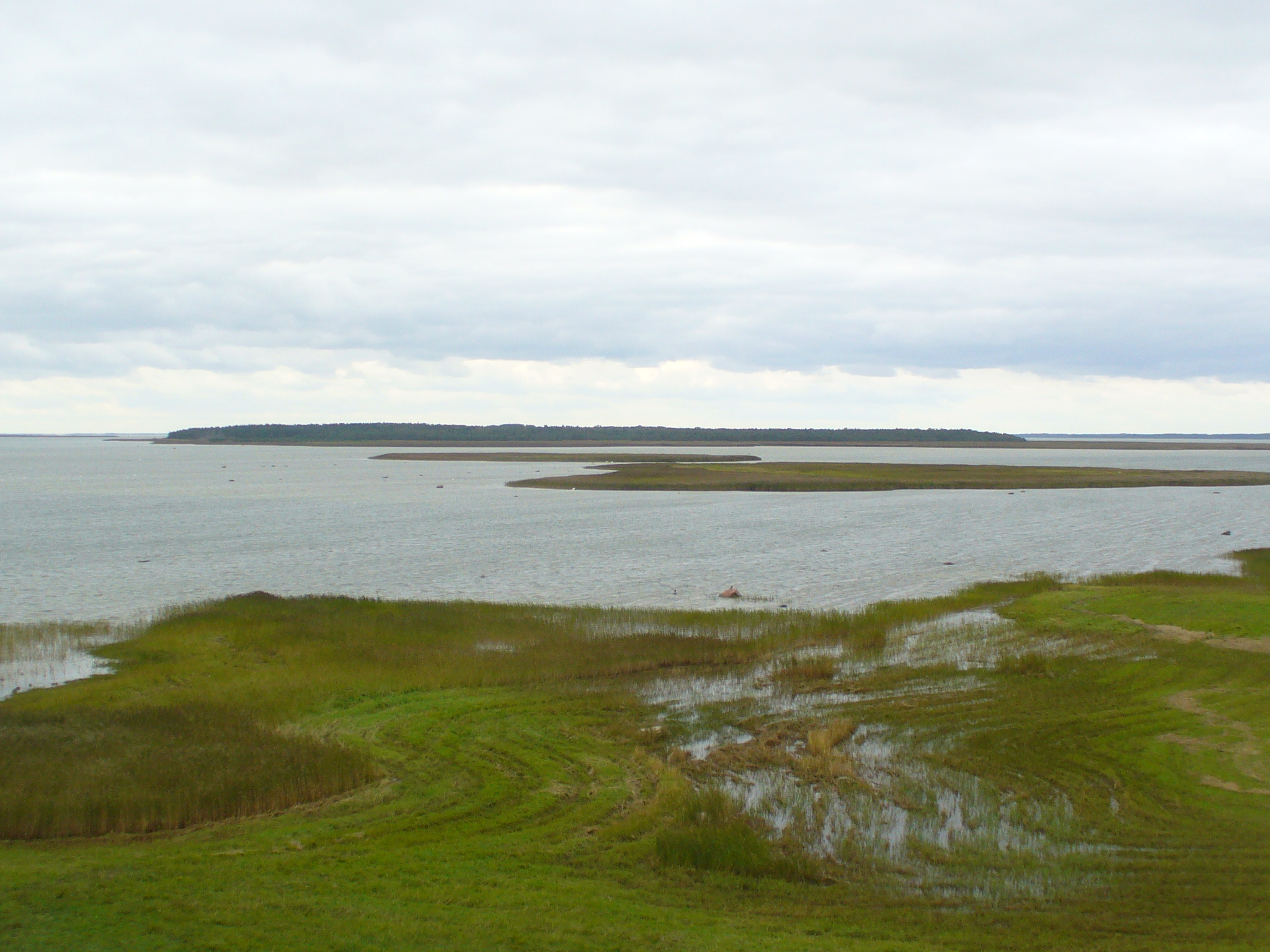 Vaade Puise külast Jugassaarelt Tauksile, eespool Siimurahu ning selle taga teine väiksem rahu.